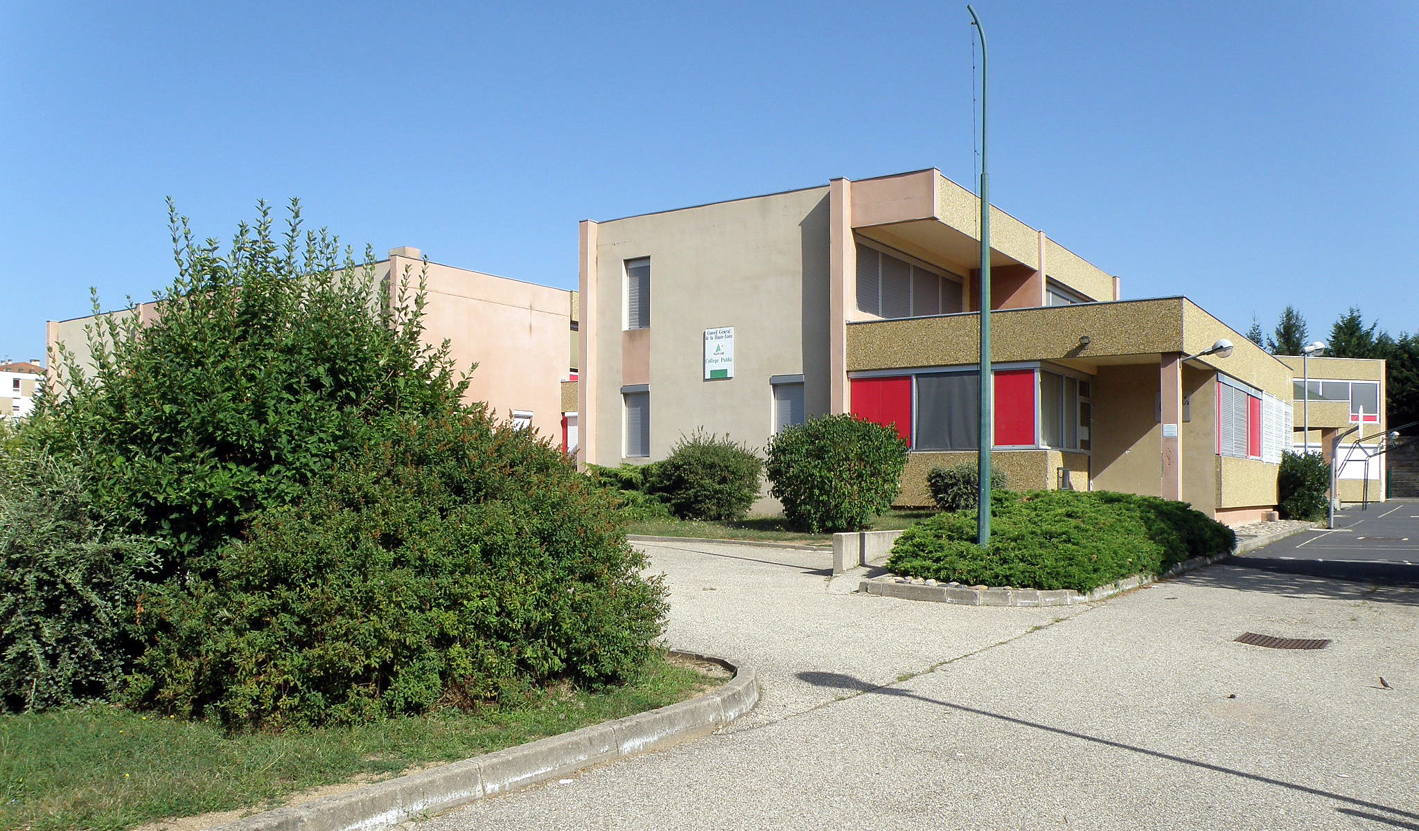 Retournac, dép. de la Haute-Loire, France (Auvergne). Collège public Boris Vian.